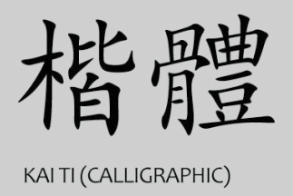 Style de caractère Chinoi de type Kai Ti